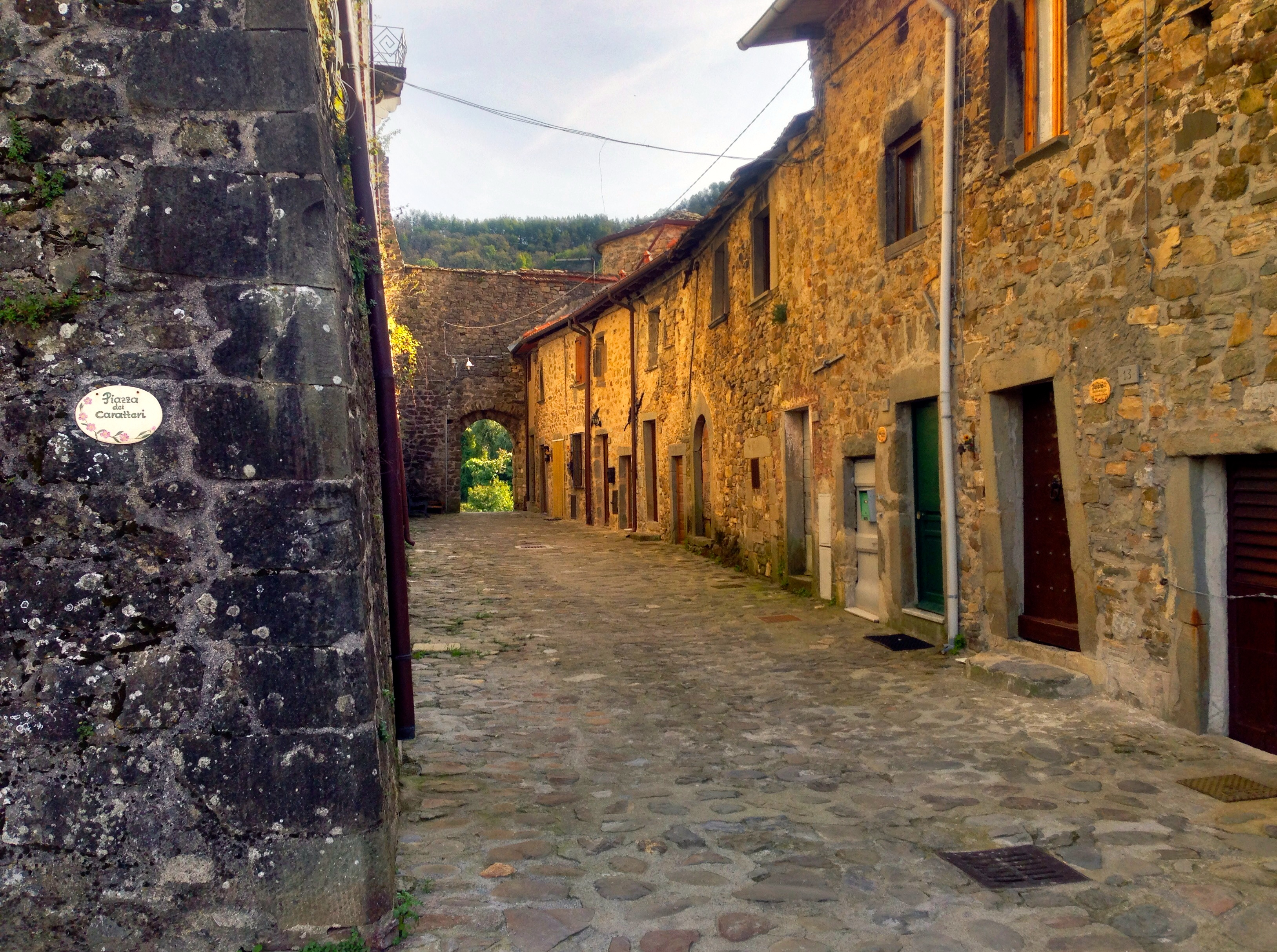 Piazza dei caratteri nel borgo di Castevoli, Mulazzo (MS) Summary Piazza dei caratteri del borgo di Castevoli